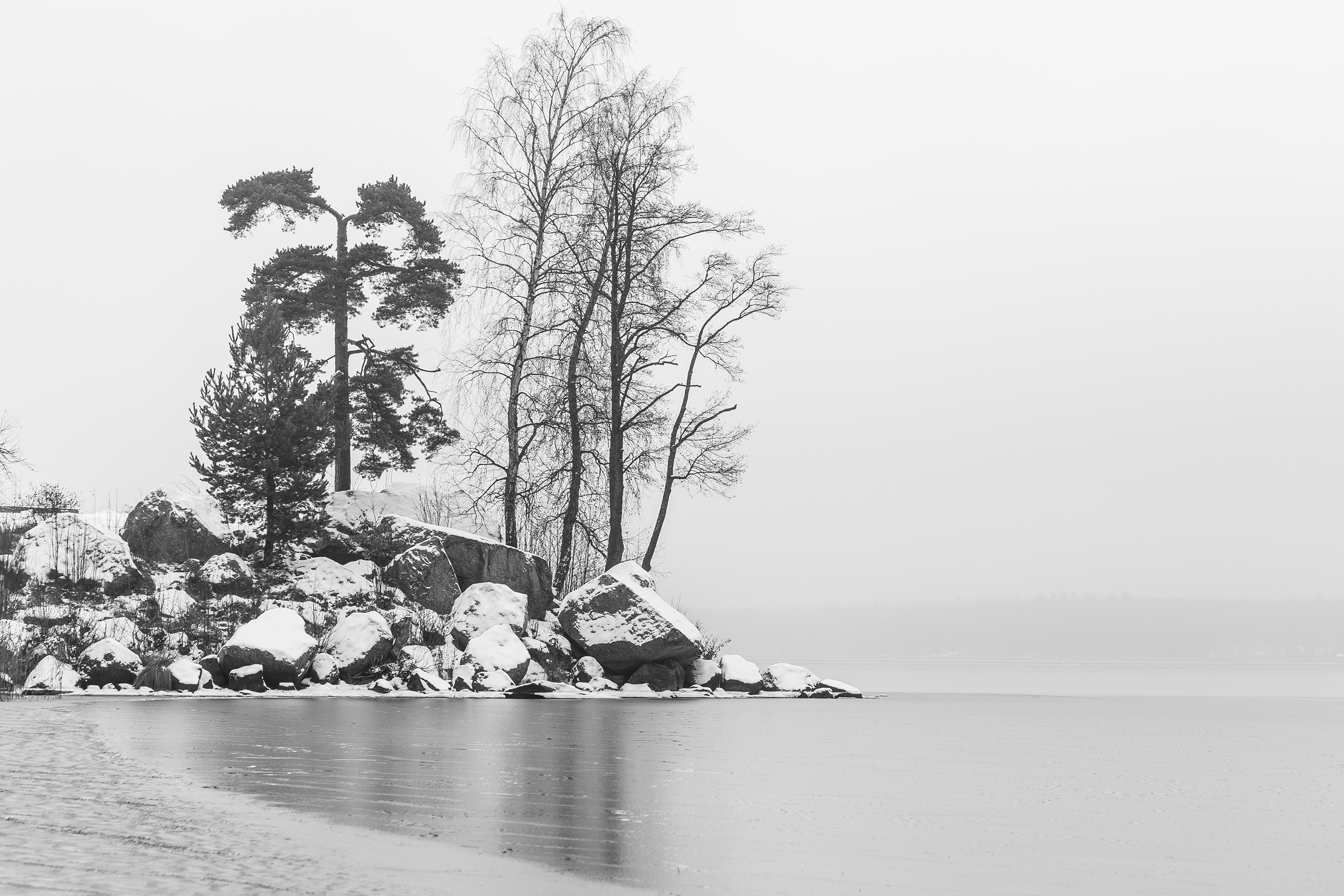 Парк Монрепо: в северной части города на берегу бухты Защитной Выборгского залива, Выборг, Выборгский район, Ленинградская область This image is related to the protected area of Russia number 4710069